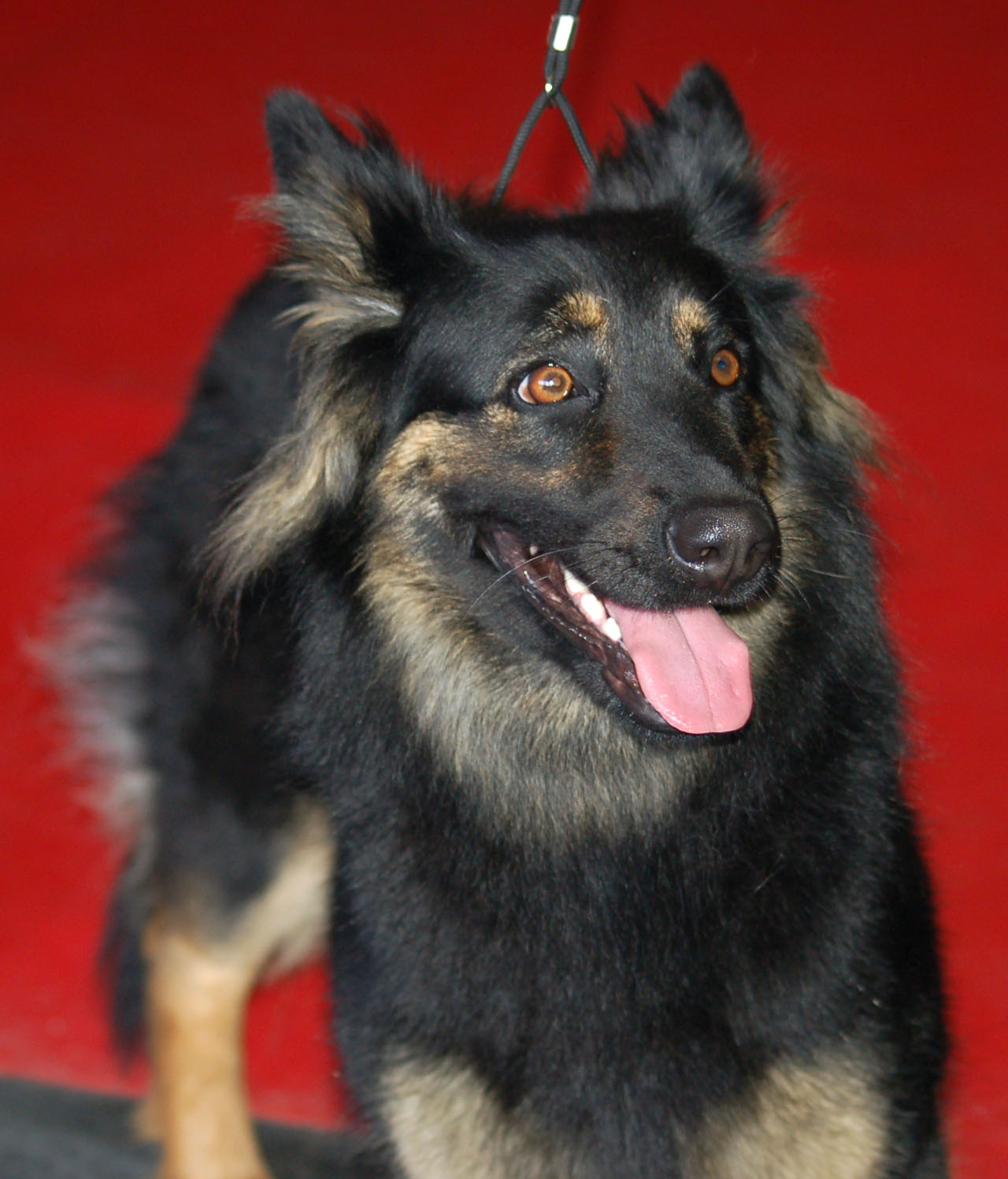 Chodsky_pes